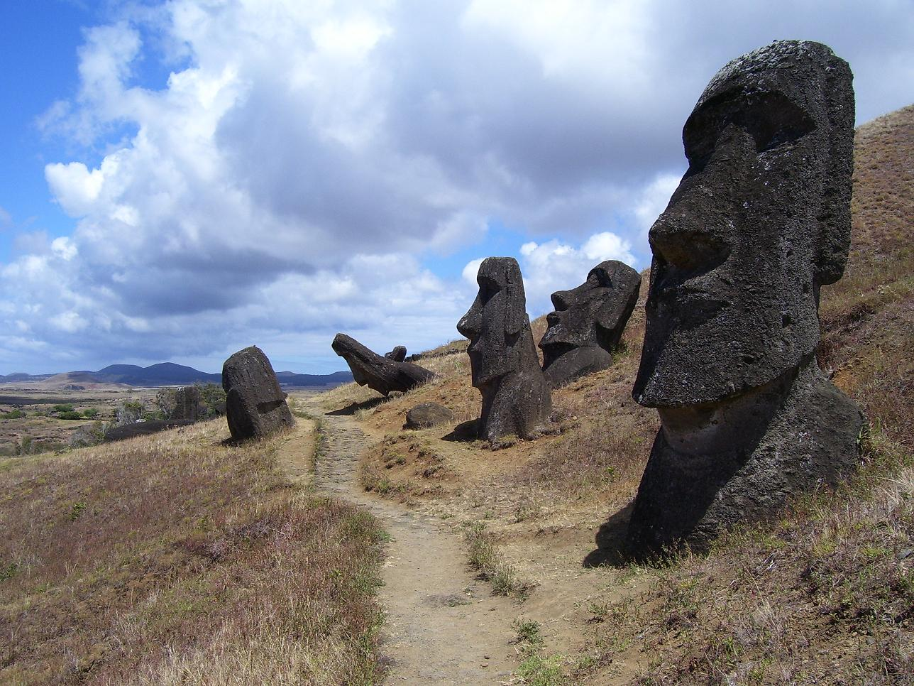 Moais, Isla de Pascua.